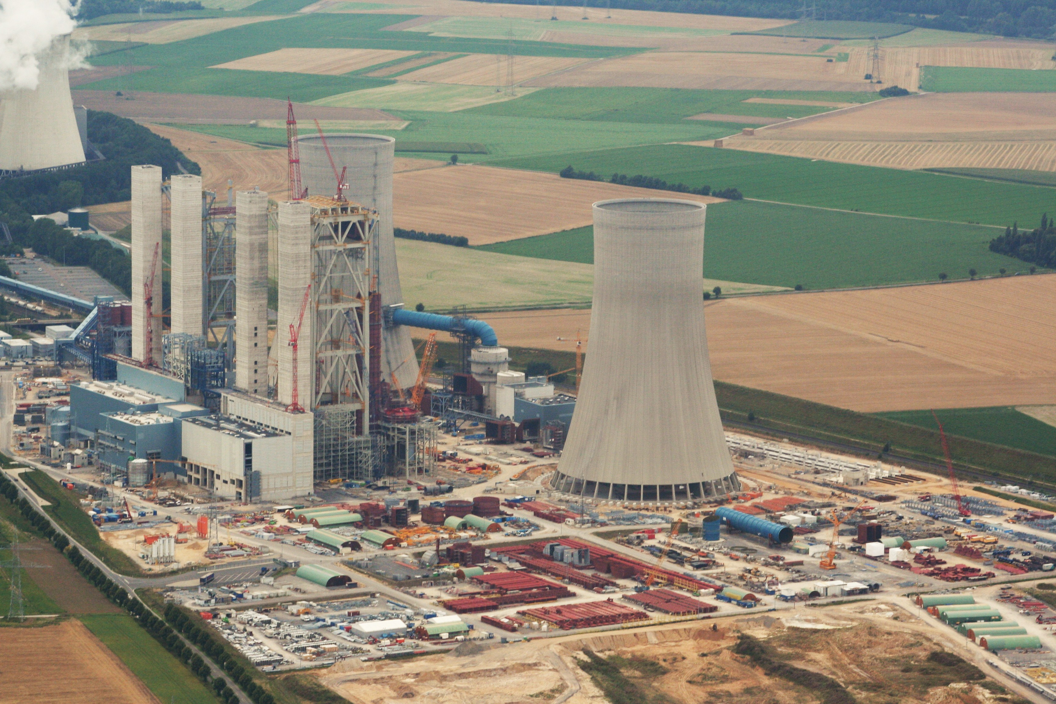 Großbaustelle des RWE: BOA 2/3 im August 2008